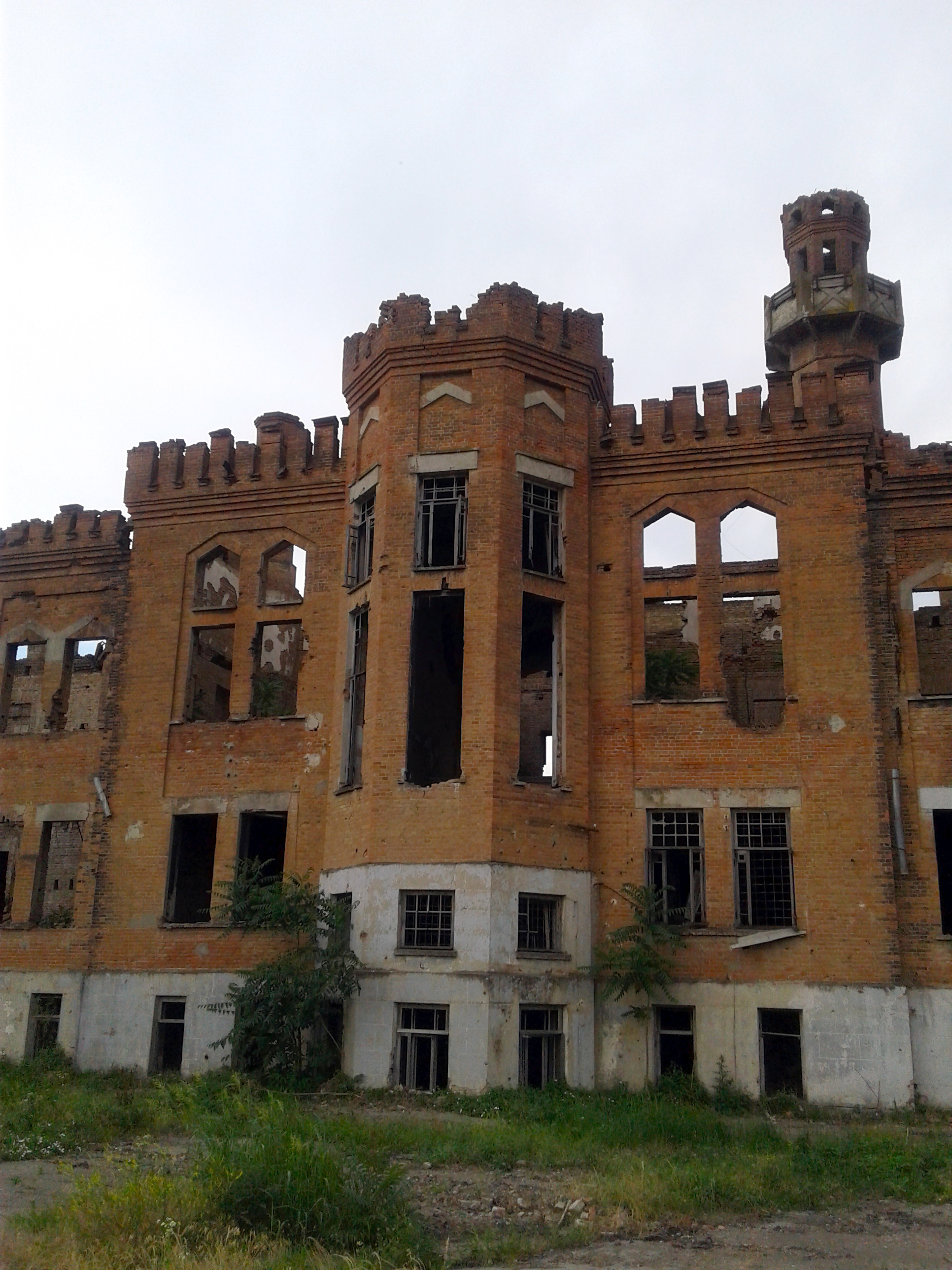 Здание Грозненского нефтяного научно-исследовательского института